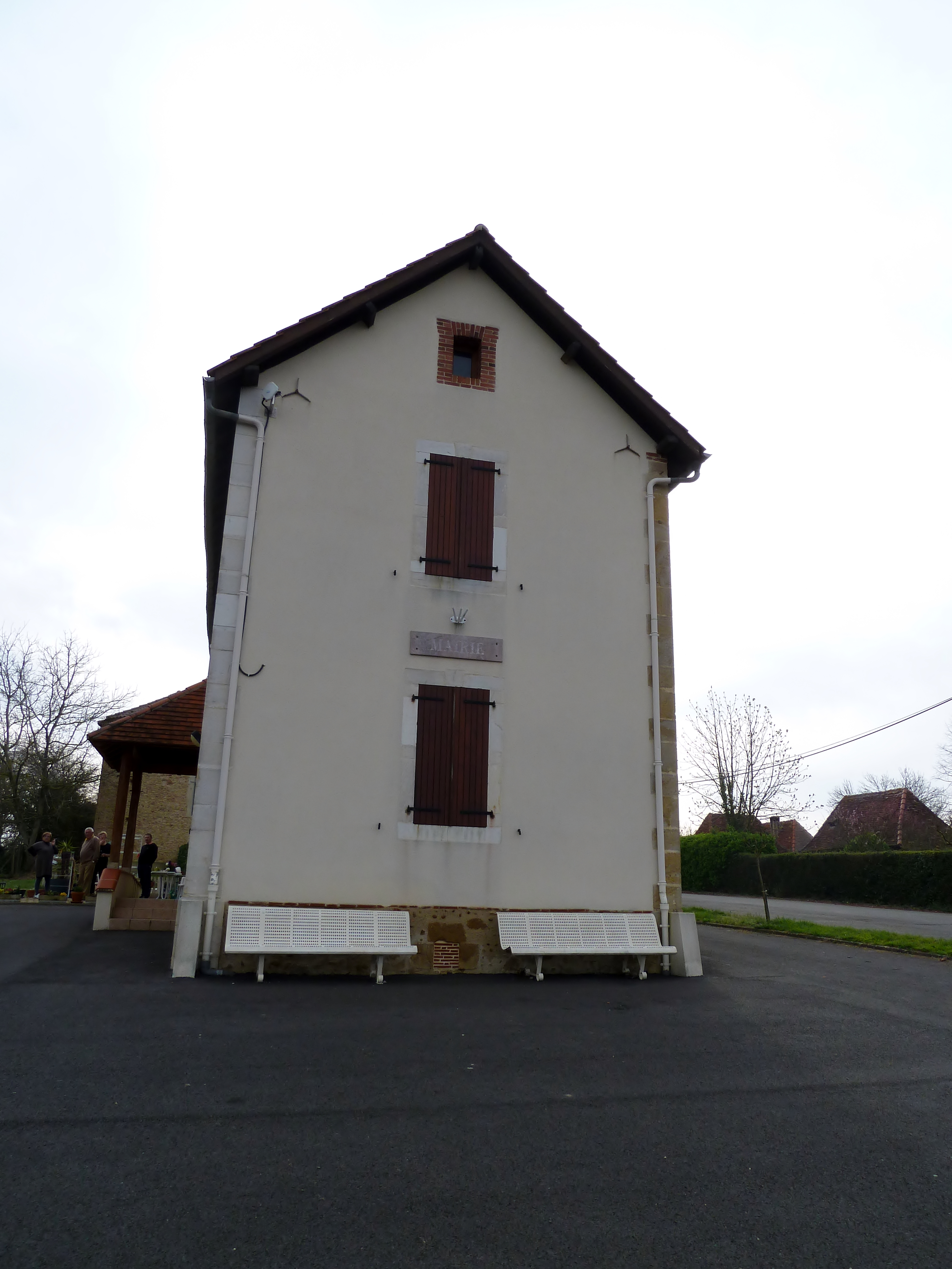 Mairie de Moncla